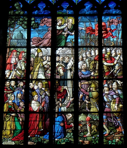 Baie 111 de l'église Saint-Pierre et Saint-Louis de Bédée (35). Saint-Léon refoulant Attila en 452 qui entendait s'emparer de Rome.